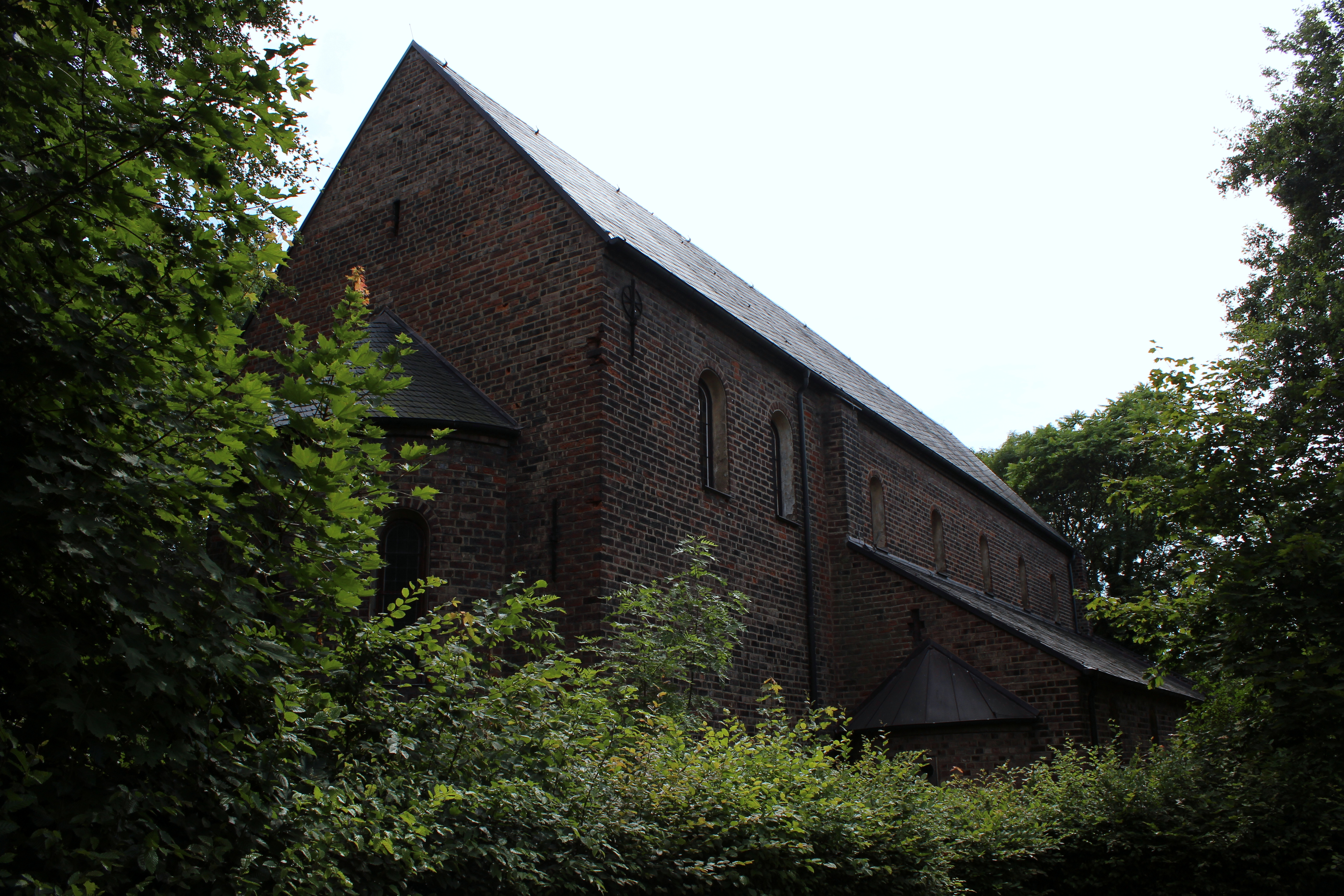 Kunigundenkirche